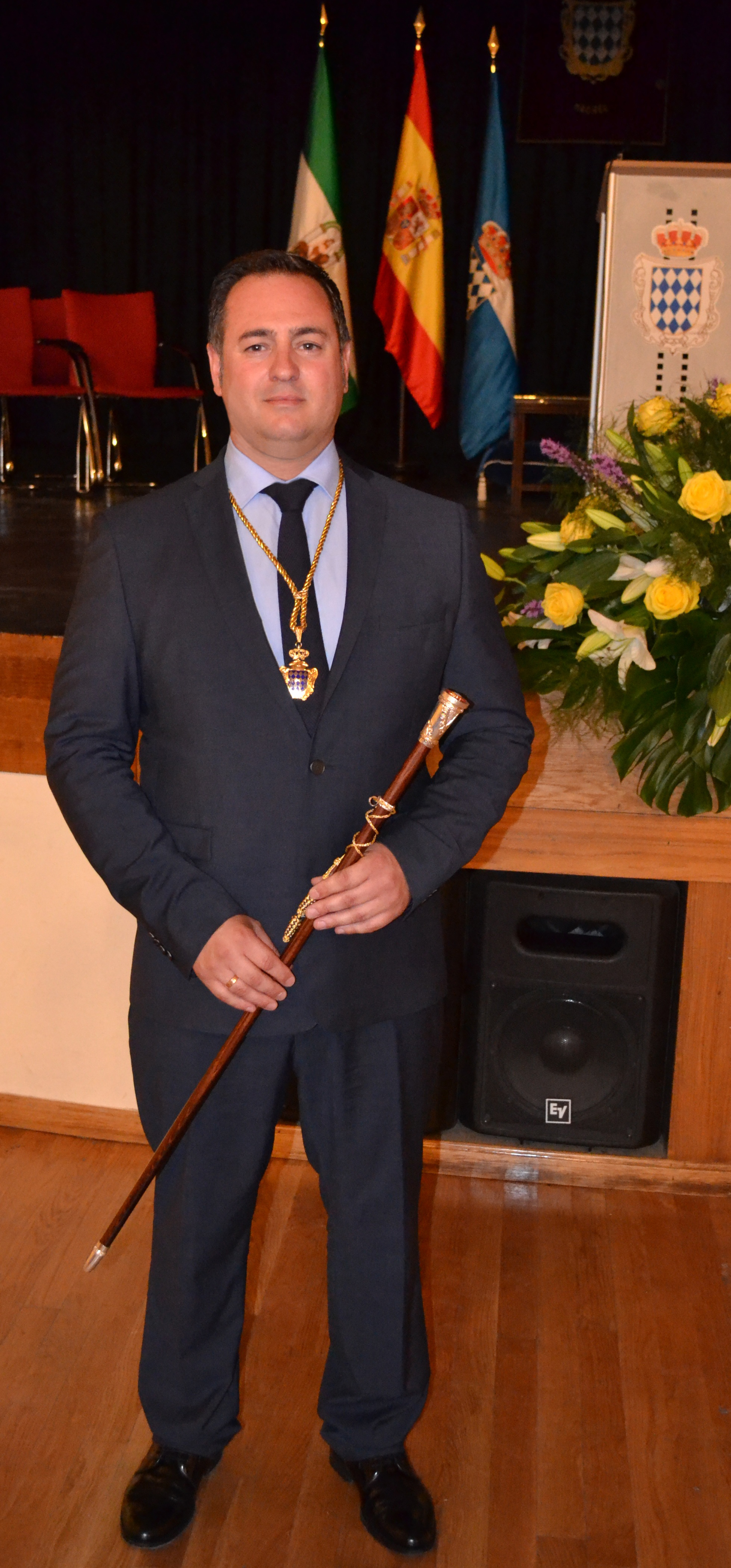 Raúl Martínez, actual regidor de la localidad de Macael (Almería)